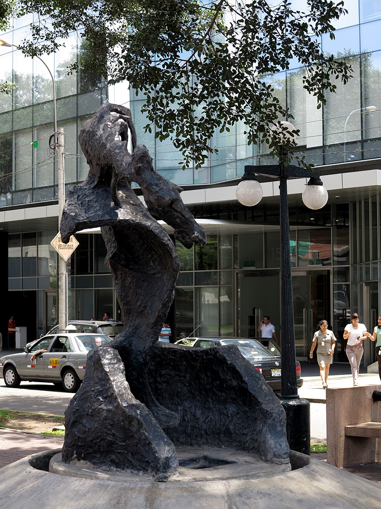 Escultura pública, hecha en bronce, ubicada en la Alameda Cristina Gálvez en el distrito de Miraflores, Lima.